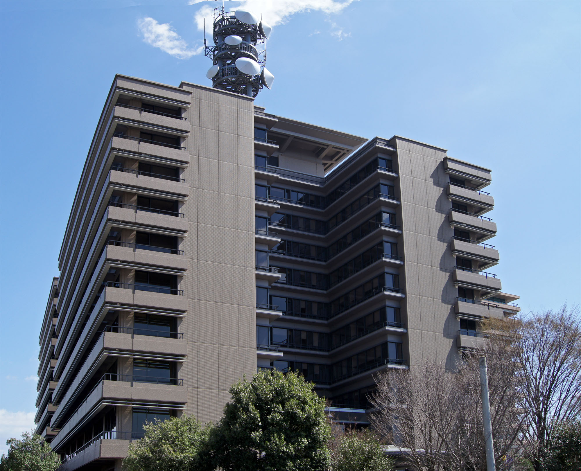 熊本県警察本部外観。 熊本県庁と隣接する。